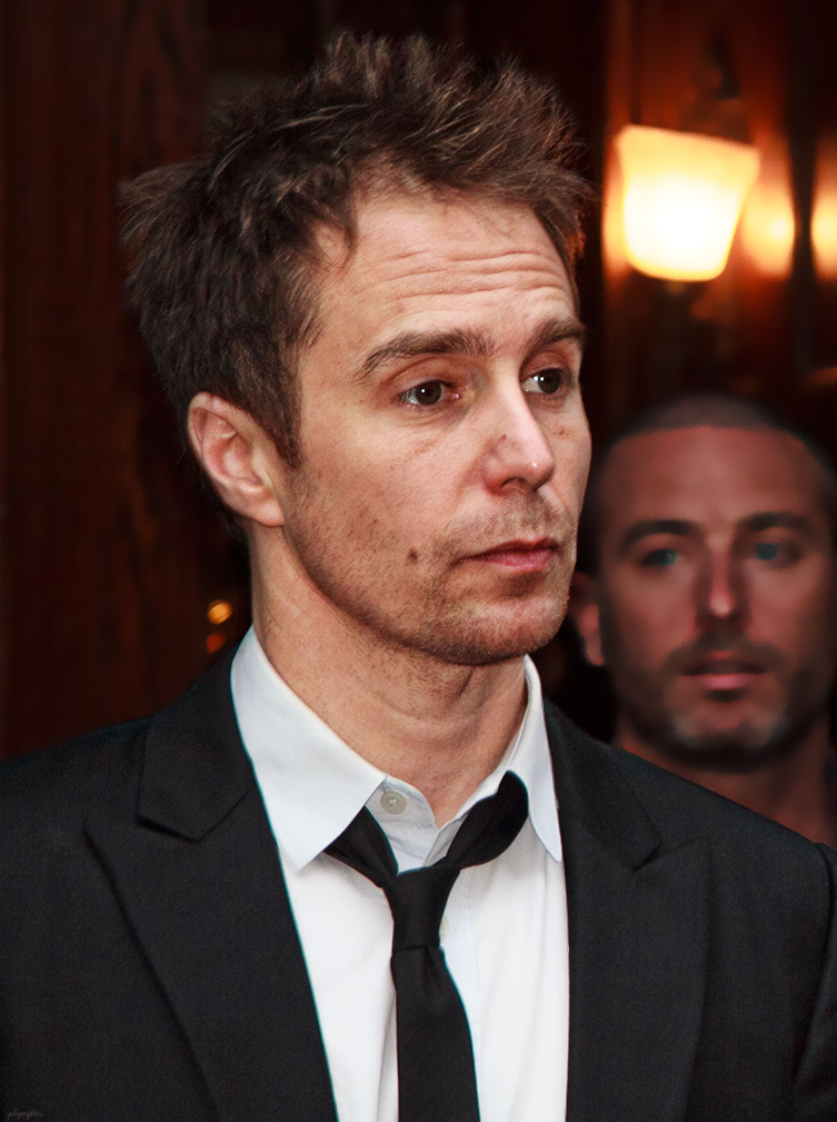 Toronto International Film Festival 2012